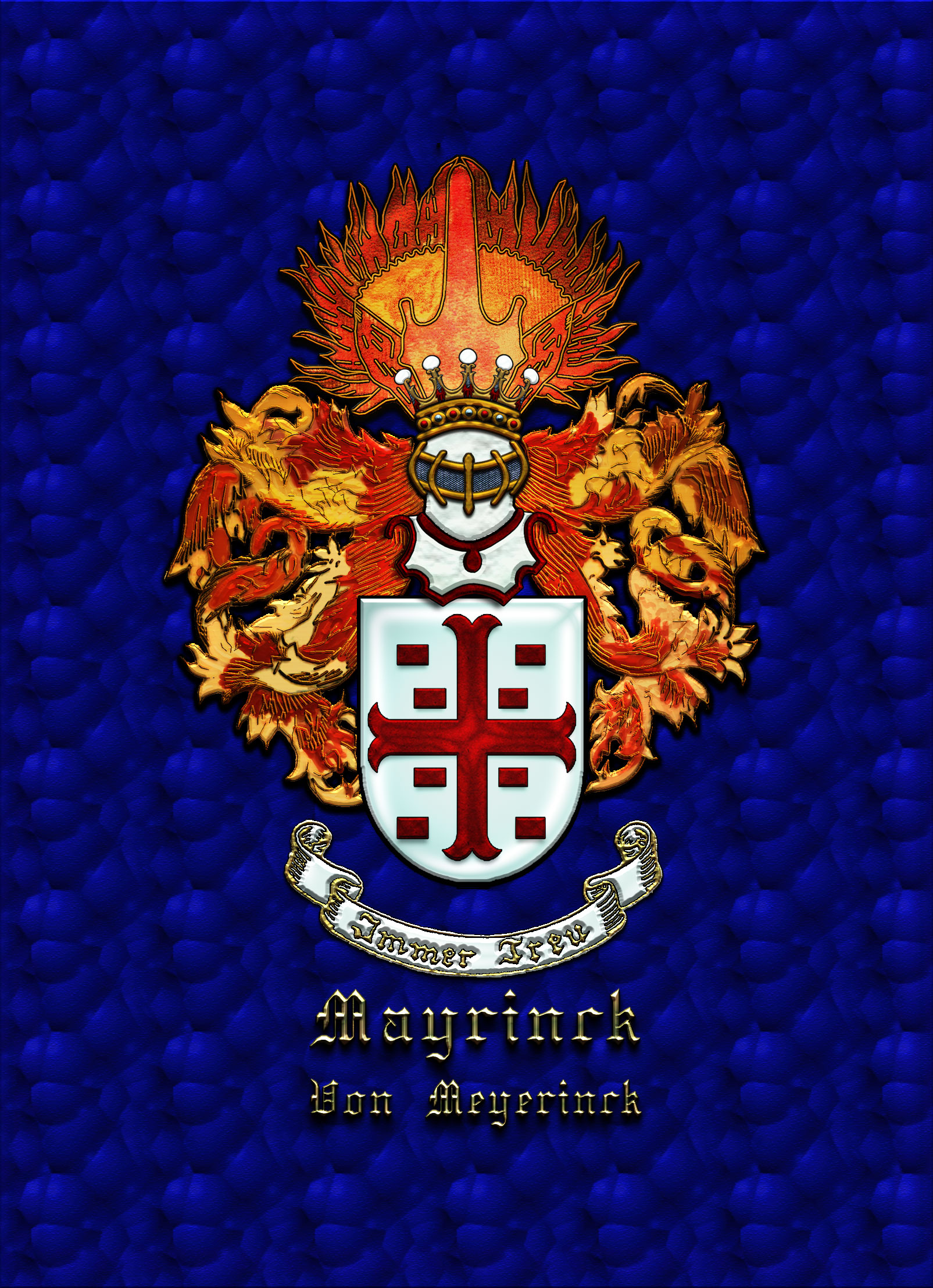 Este brasão é uma versão atualizada e restaurada pelo descendente Roberto Carlos (Mayrink) Teixeira, a partir de imagens fornecidas pela família.